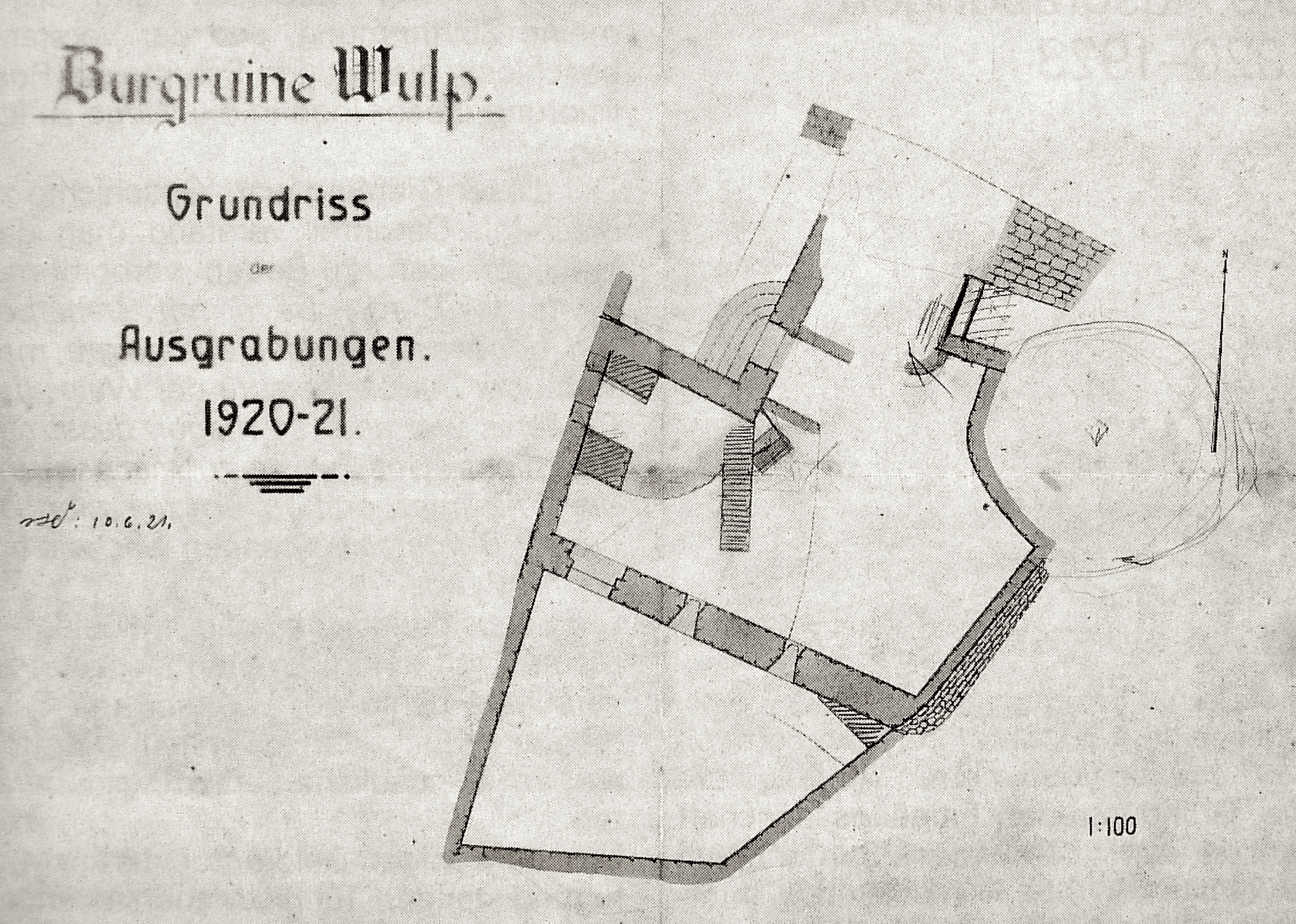 Ruine Wulp Grundrissplan der 1921 ausgegrabenen Mauern